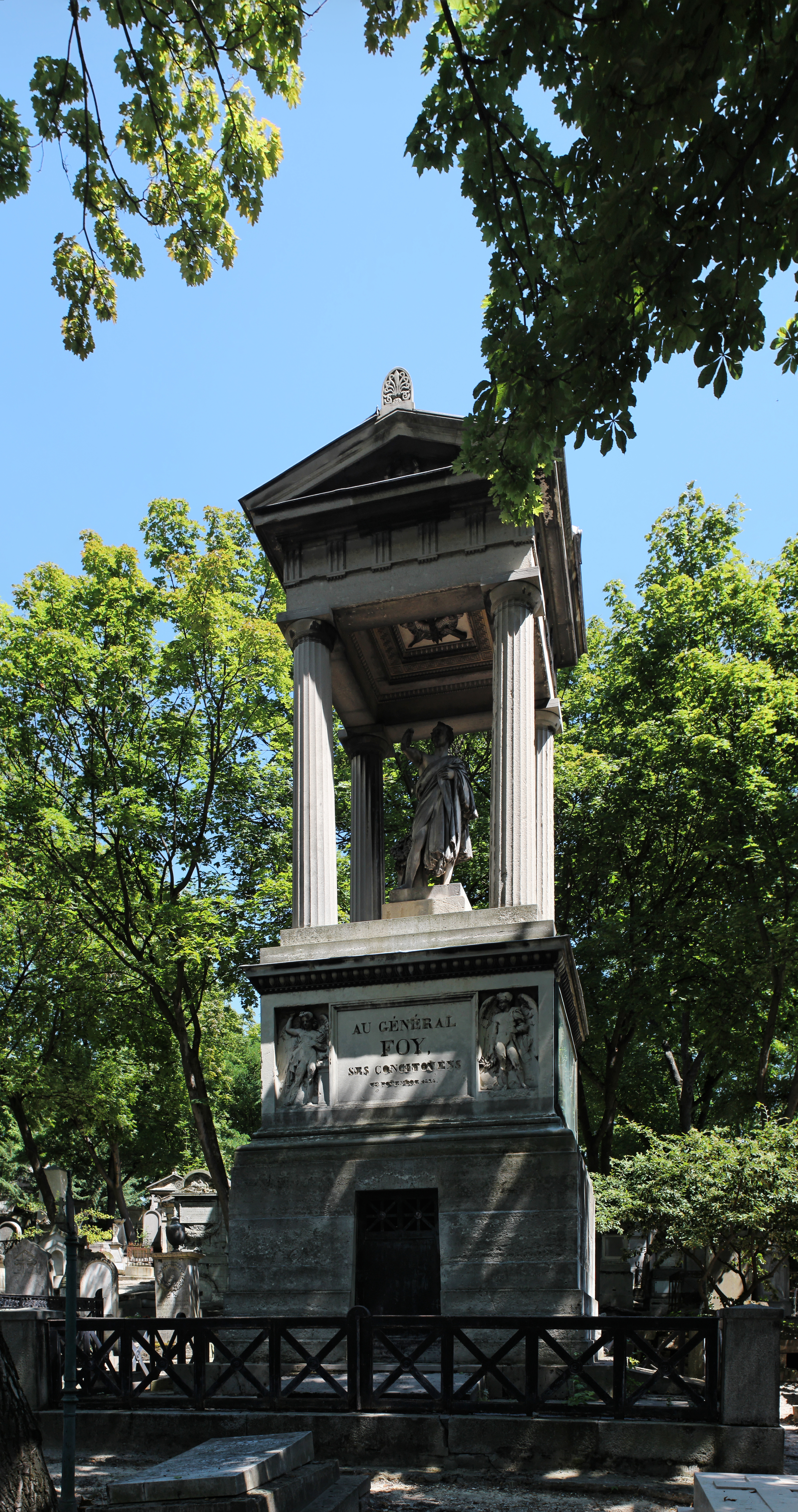 Sépulture de Maximilien Sébastien Foy (1775-1825), général du Premier Empire et un homme politique. Monument composé d'un édicule dorique abritant une statue en marbre. Le piédestal du monument est agrémenté de cinq bas-reliefs en pierre. Face antérieure : Génies de l'Éloquence et de la Guerre ; face postérieure : le Général Foy à la tribune ; côté gauche : le Général Foy en Espagne ; côté droite : les Funérailles du Général Foy. Le monument fut un point de ralliement des bonapartistes.